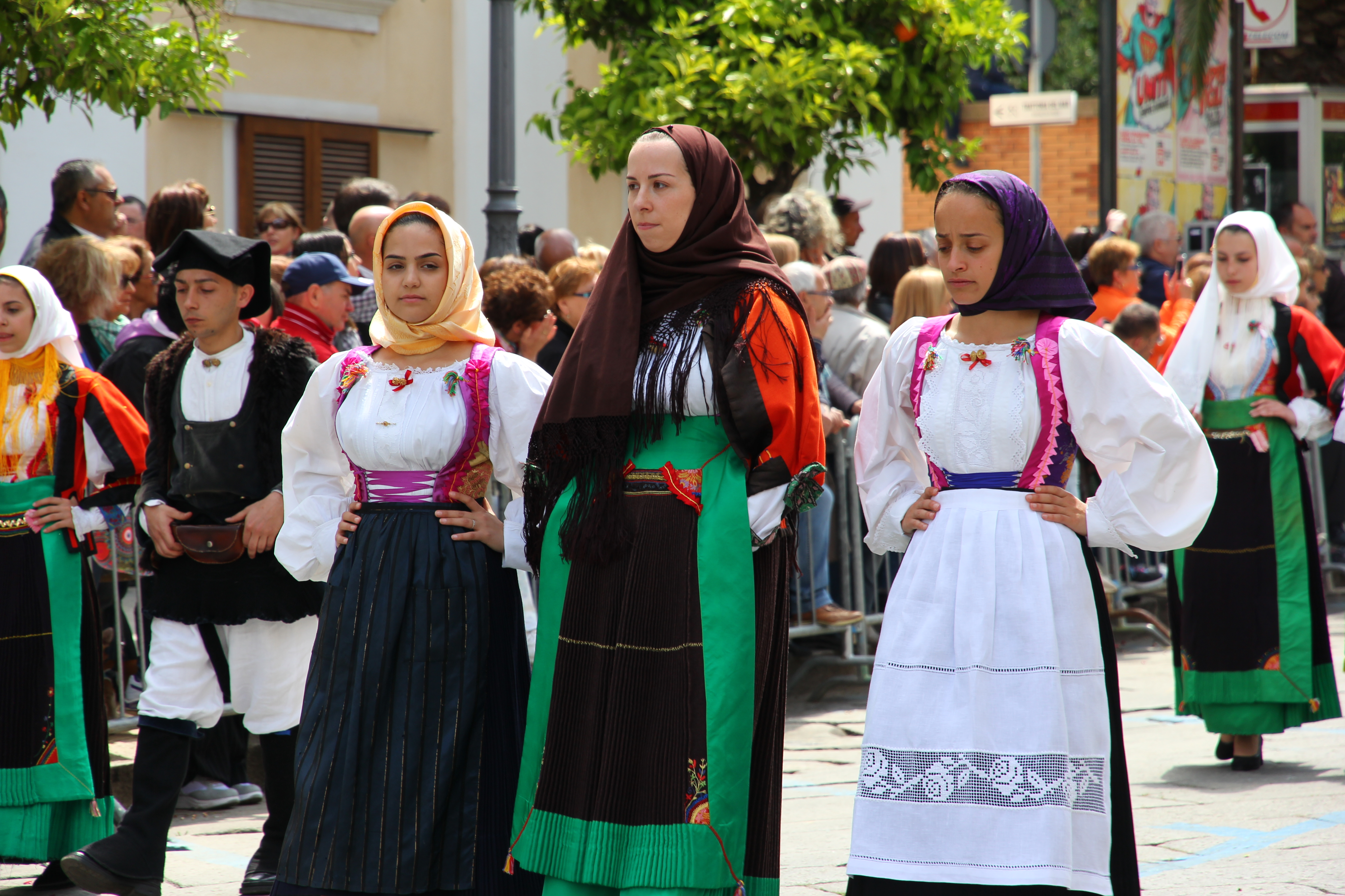 Costume tradizionale